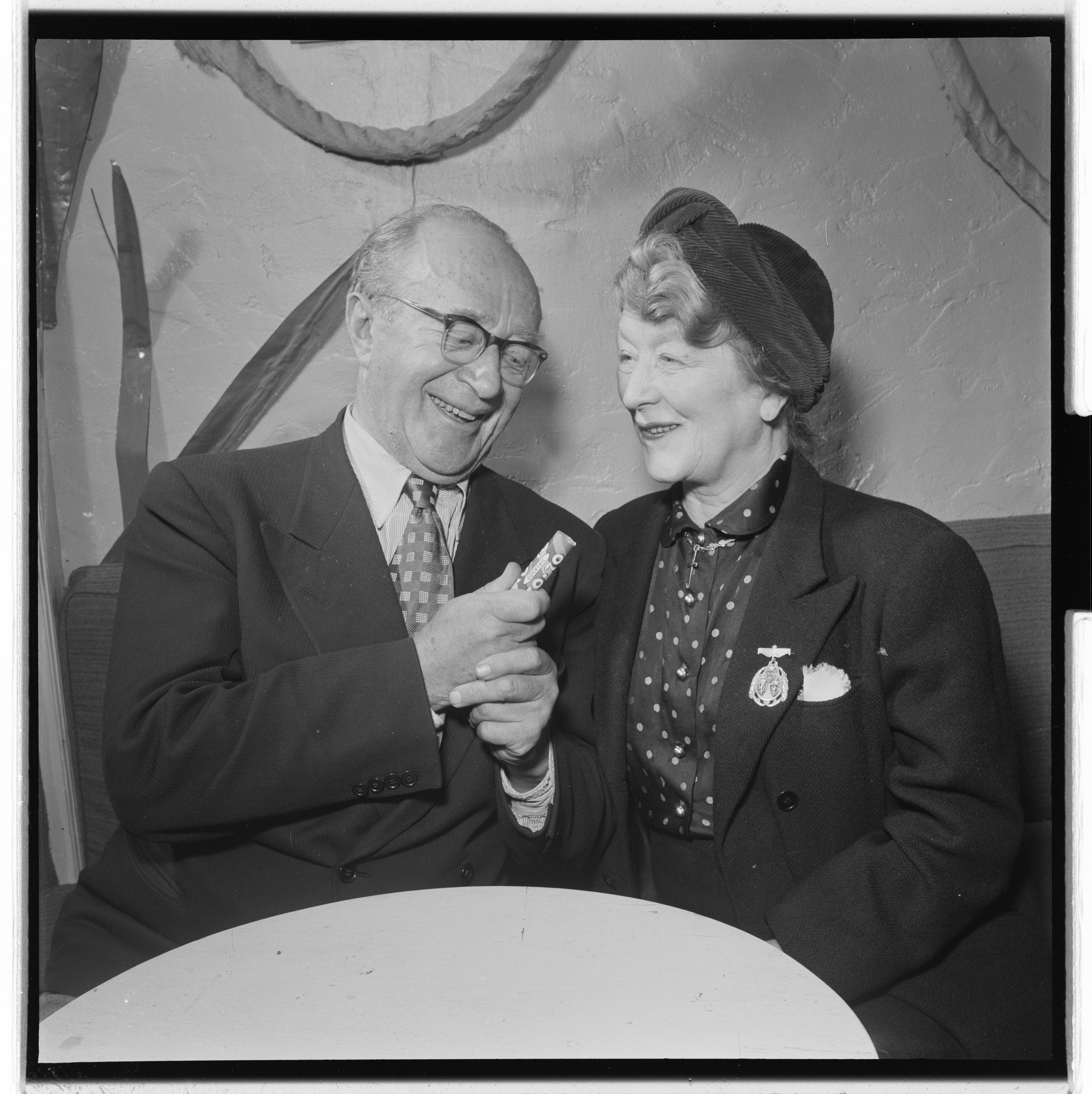 Bildet er hentet fra Arkivverket. Reklame for Kiellands dropsfabrikk, Oslo. Med Lalla Carlsen og Holst Jensen Arkivinstitusjon : Riksarkivet Arkivnavn : Billedbladet NÅ Sted : Norge, Ukjent, Ukjent, Ukjent Emneord: Reklame, Industri, Godteri Avbildet: Carlsen, Lalla; Jensen, Holst